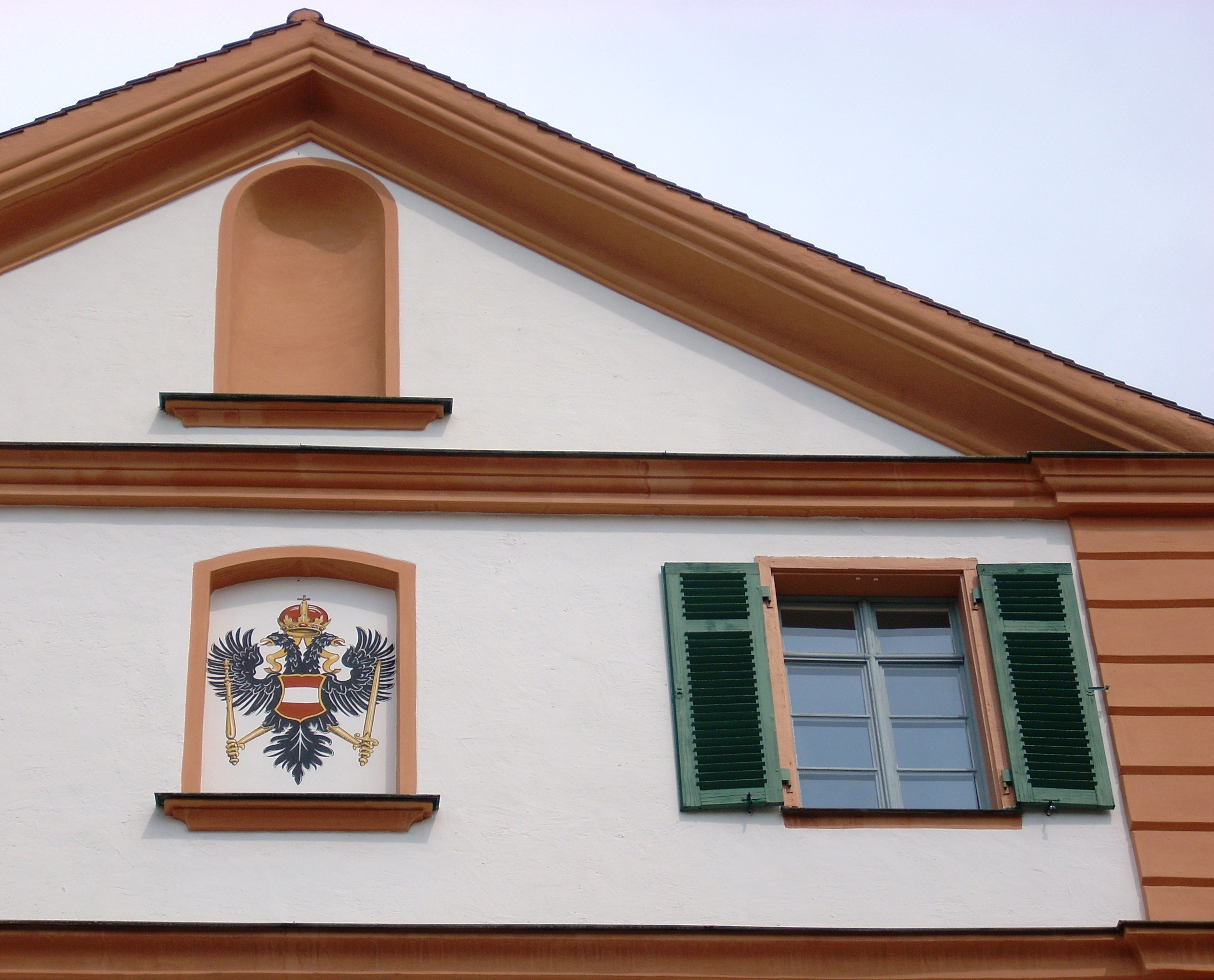 Ehingen, Giebel des Ständehaus mit österr.Doppeladler